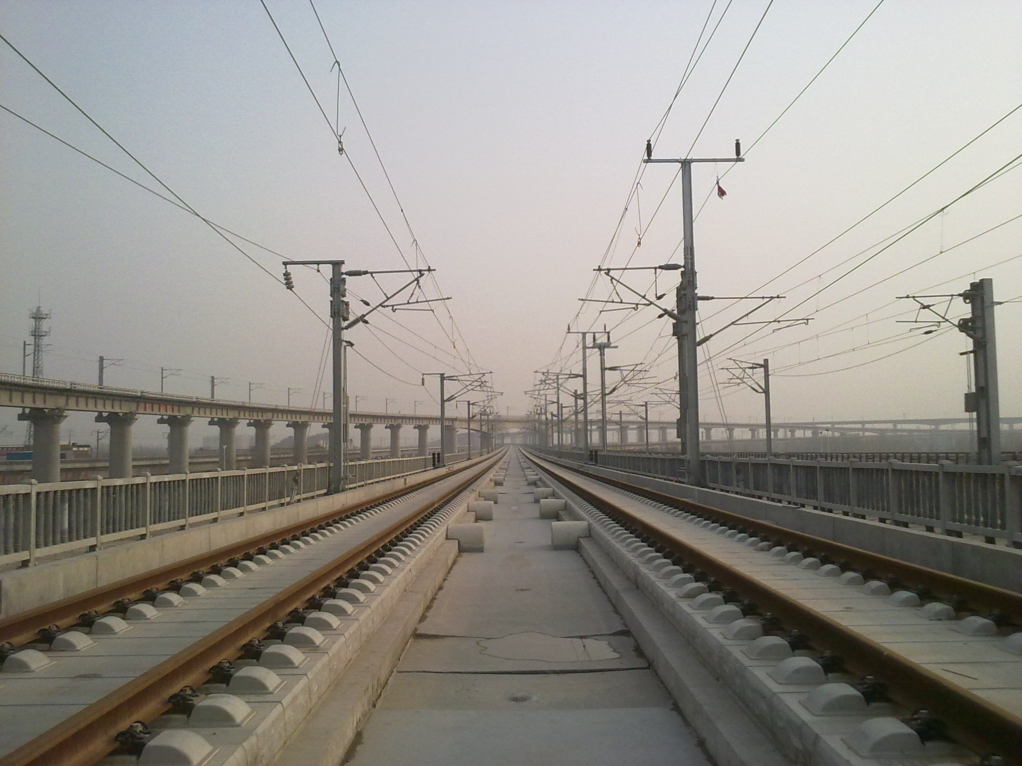 中文（中国大陆）: 郑州东站南边铁路立交桥，石武客运专线正线